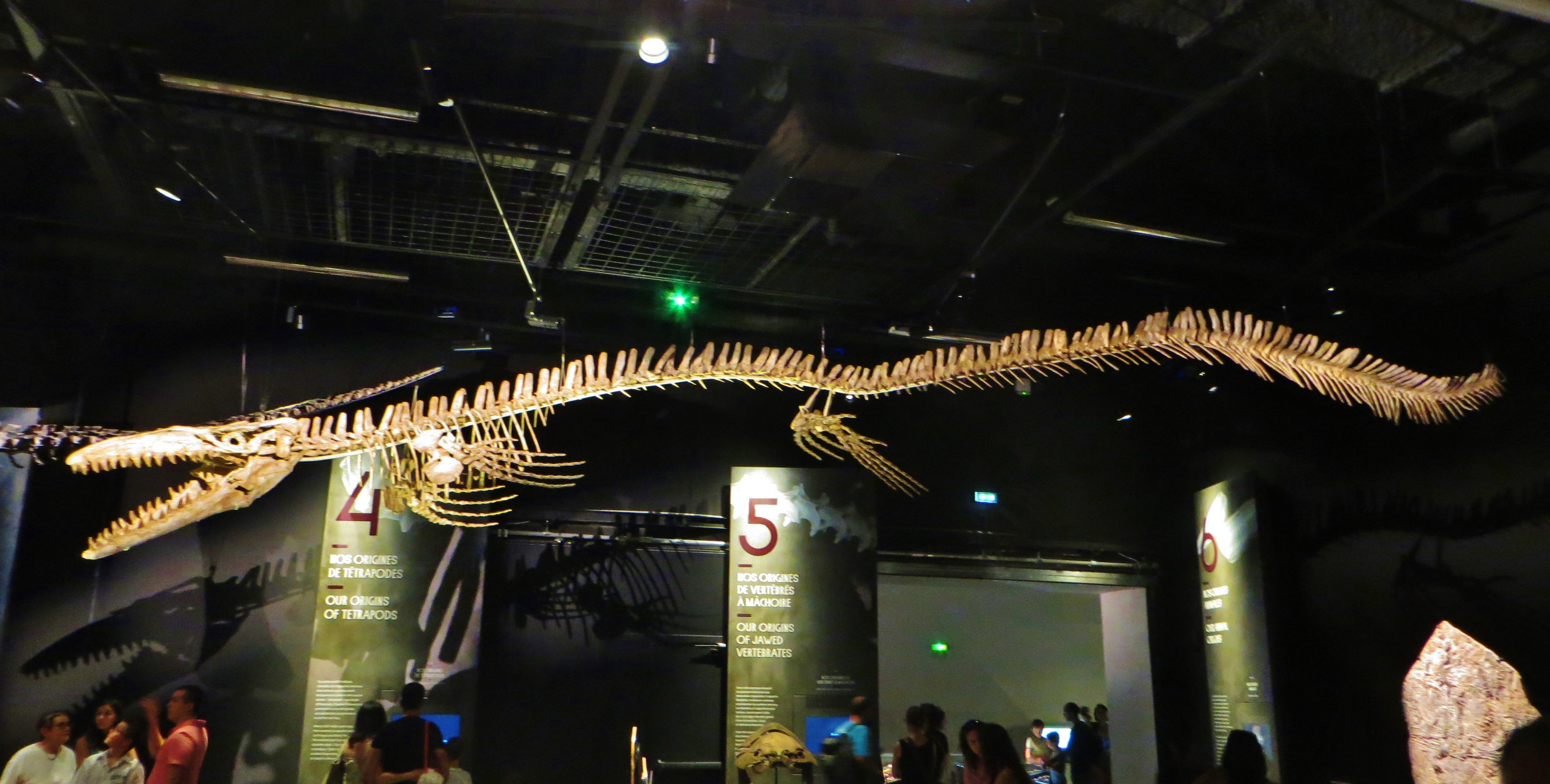 Fossil - Took the picture at Musee des Confluences, Lyon